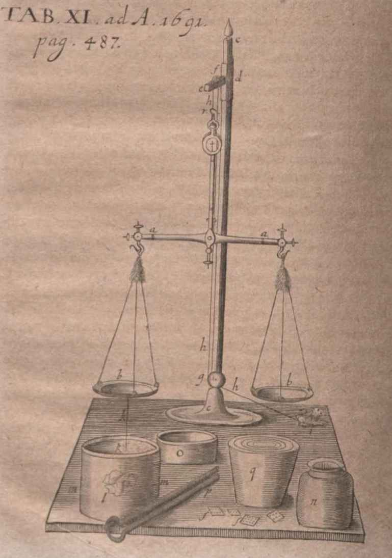 Illustration